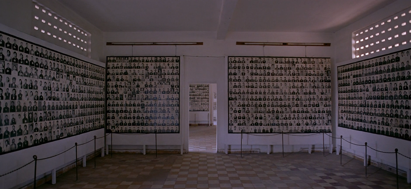 ഓഷ്വിറ്റ്സ് കോൺസെൻട്രേഷൻ ക്യാമ്പ്